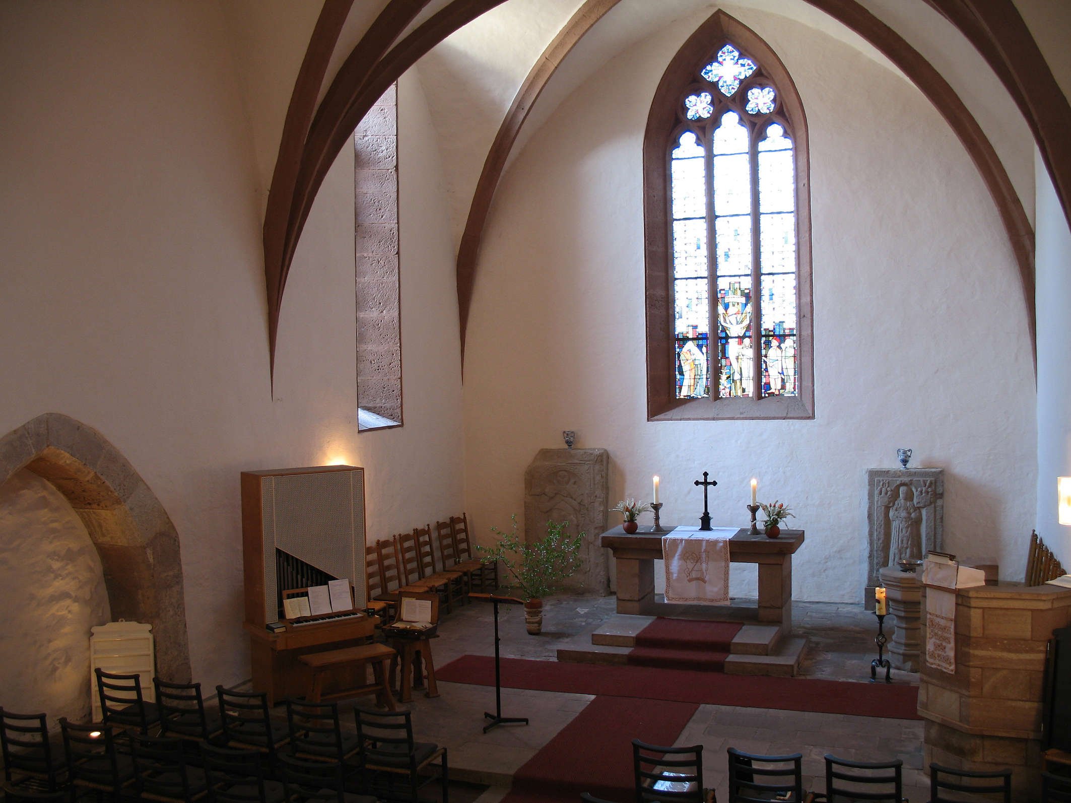 Innenraum der Klosterkirche Mariengarten, Landkreis Göttingen, Niedersachsen